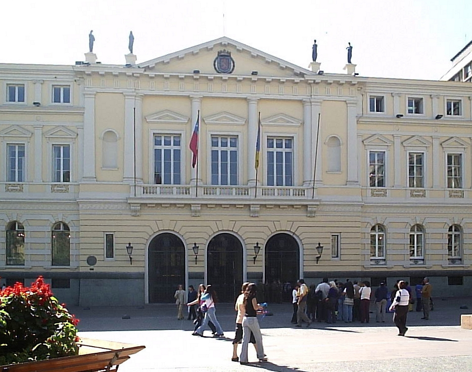 Palacio Consistorial Municipalidad de Santiago Autor:Alstradiaan Alstradiaan Blog Fecha:Abril de 2005 Fotografía tomada con una cámara digital Olympus camedia D-395 de 3.2 megapixeles